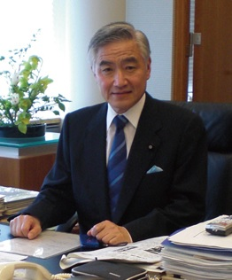 参議院議員